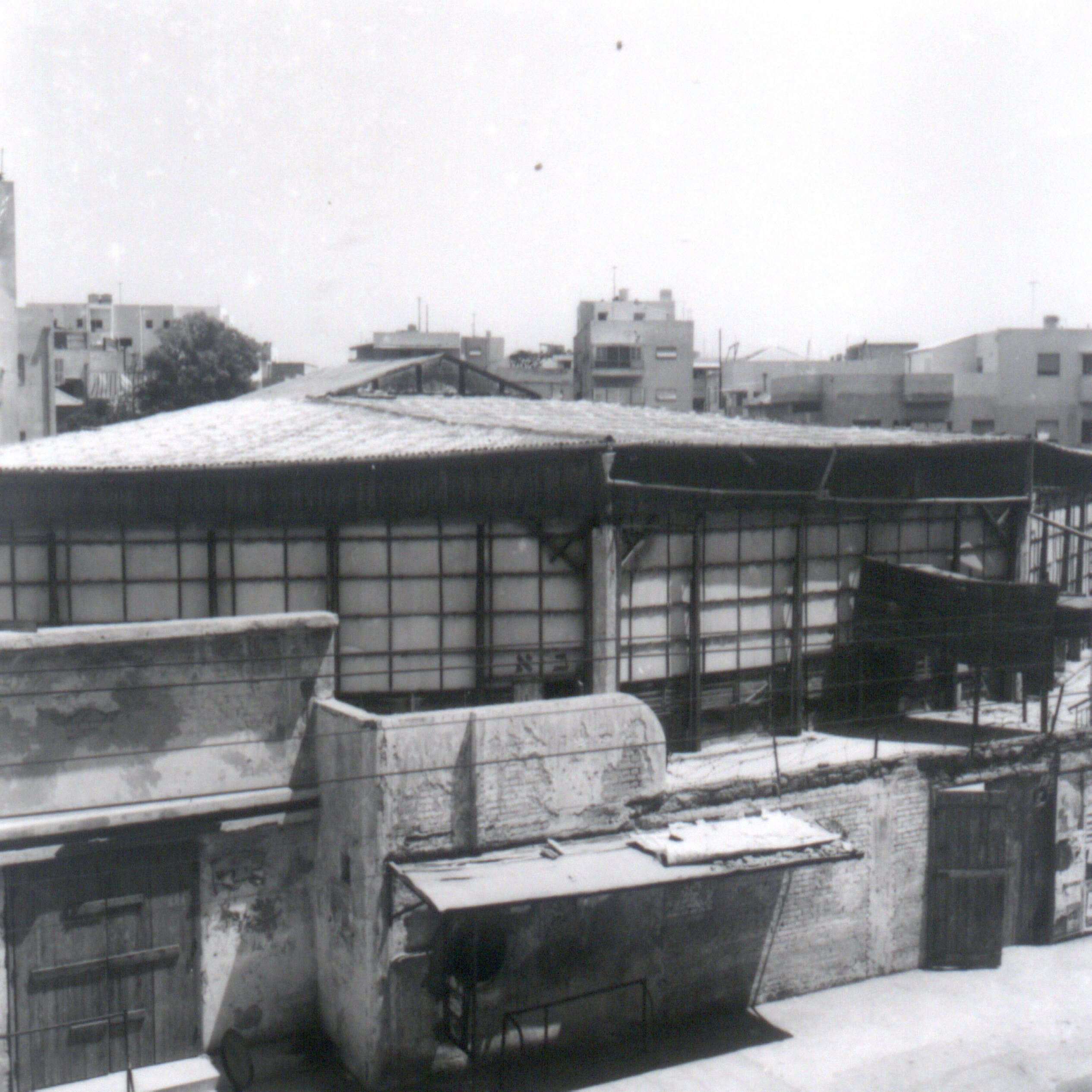 בית העם בשנת 1959 לפני הריסתו